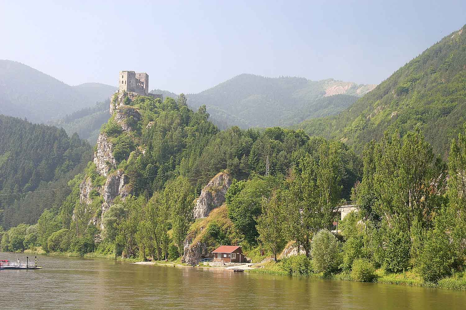 Castle Strečno, District Žilina, Slovakia autor: Prazak Date : 28. 6, 2006